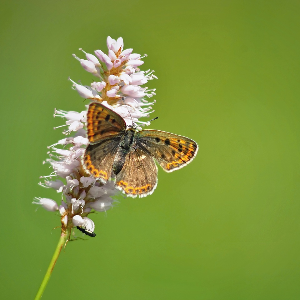 Ohniváček černoskvrnný, Karlovarsko, 2014